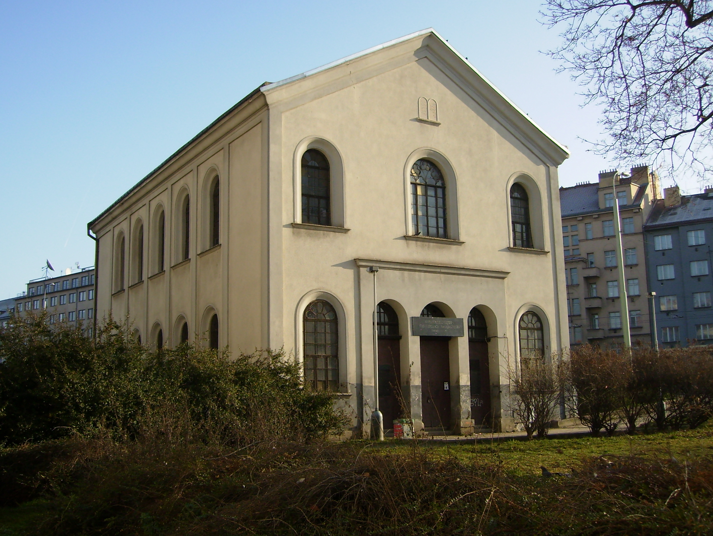 Libeňská synagoga, stav z prosince 2006. Autor Petr Vilgus